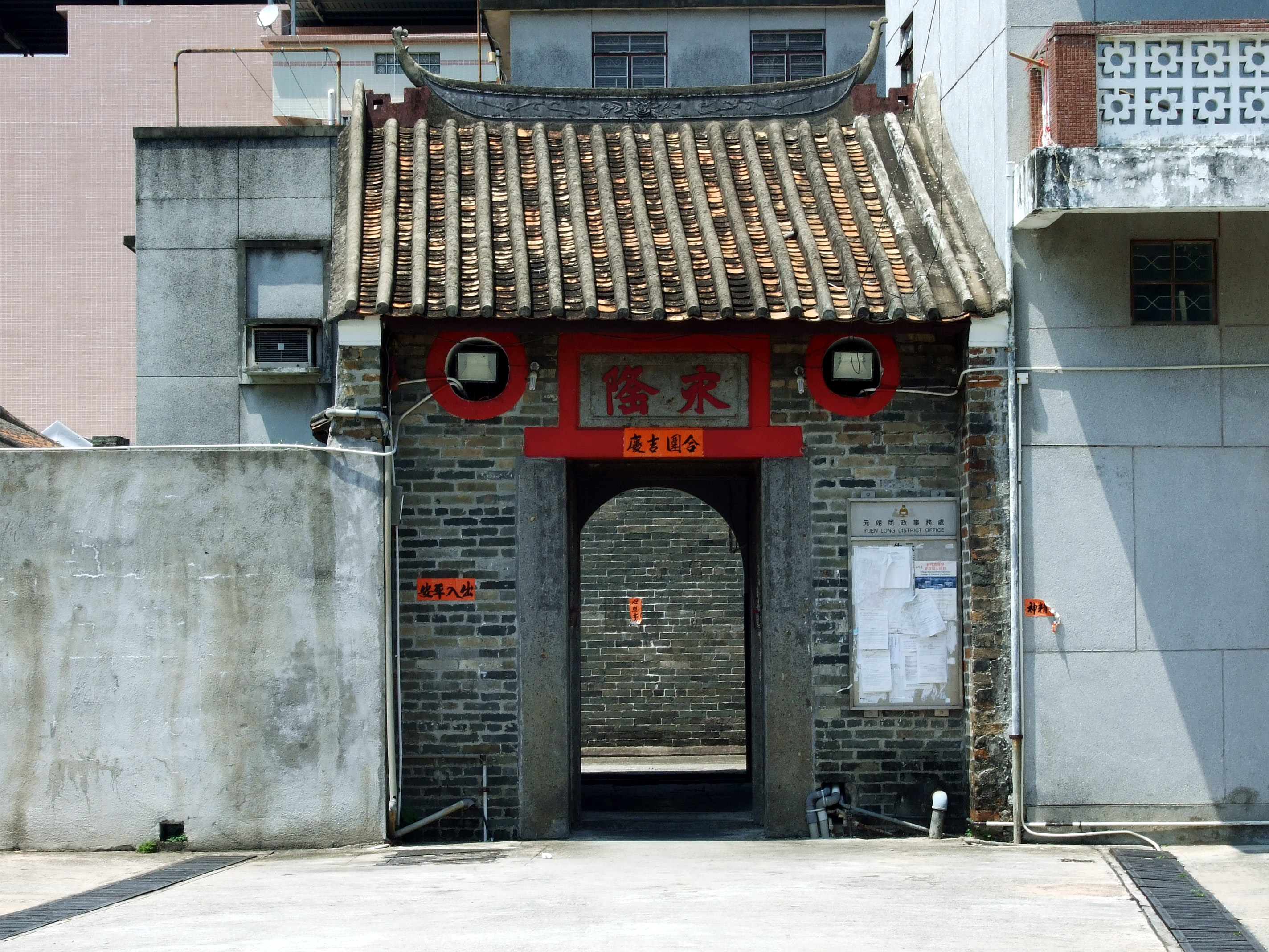 中文（香港）: 錦田永隆圍圍門